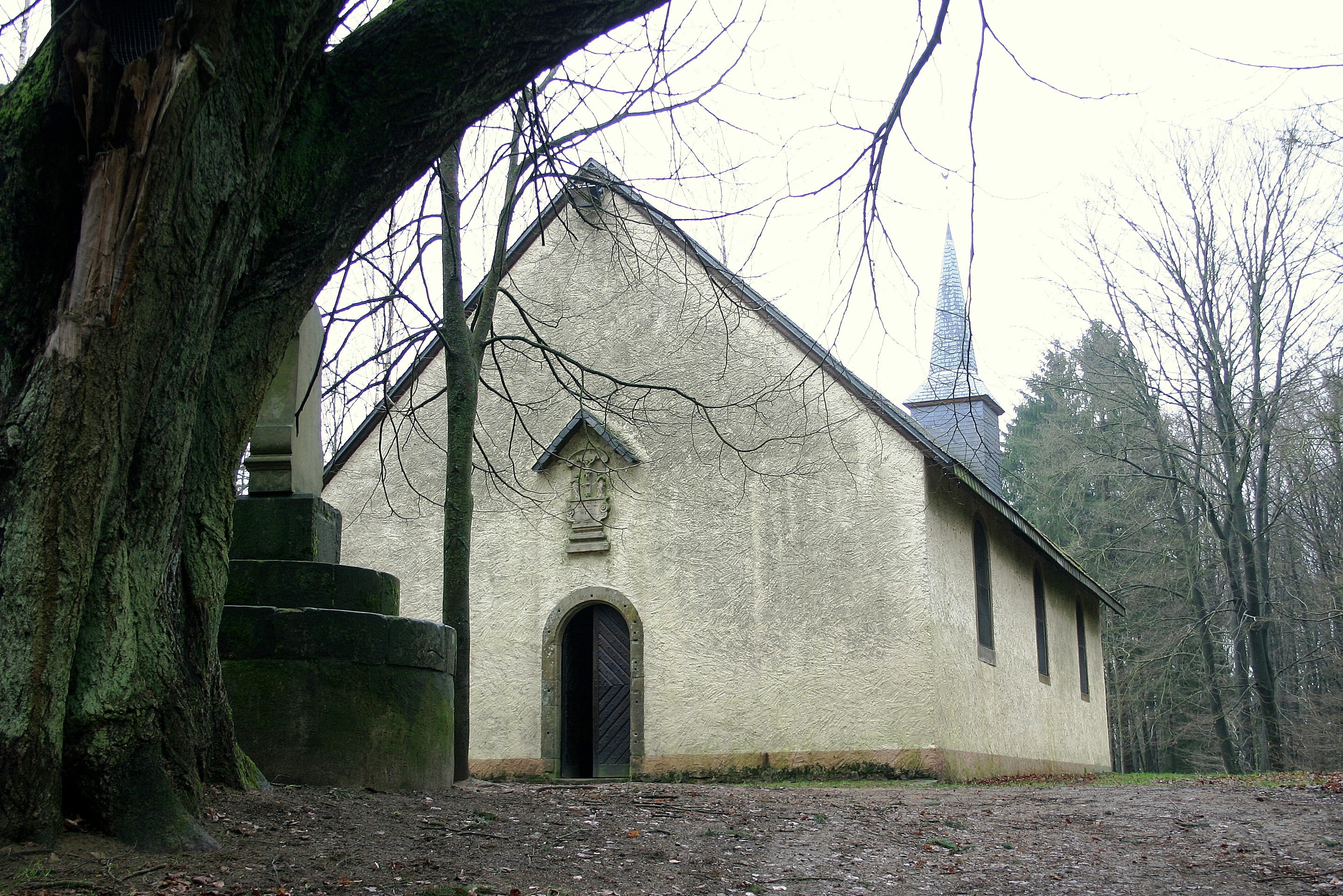 Jobskapell um Kuelebierg.